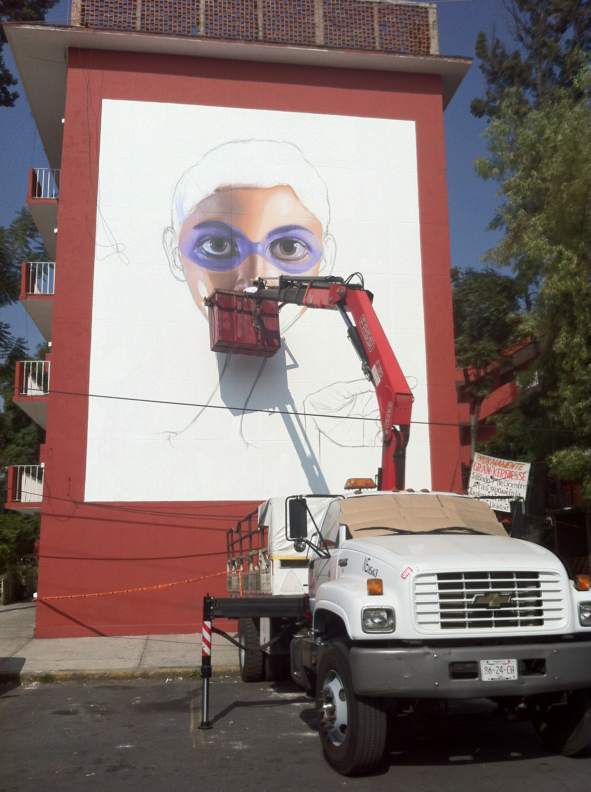 Toma fotográfica hecha en el momento de la ejecución del mural urbano. Es importante mencionar que es arte urbano y es considerado un fenómeno social popular (mejor conocido como Graffiti). Al no haber sido terminada la obra, como se ve, no se infringe en ninguna penalización de derechos de autor, pues al retratar el momento de su ejecución, es considerado más como una manifestación de arte urbano (parecido al performance) que a un trabajo ya concluido.